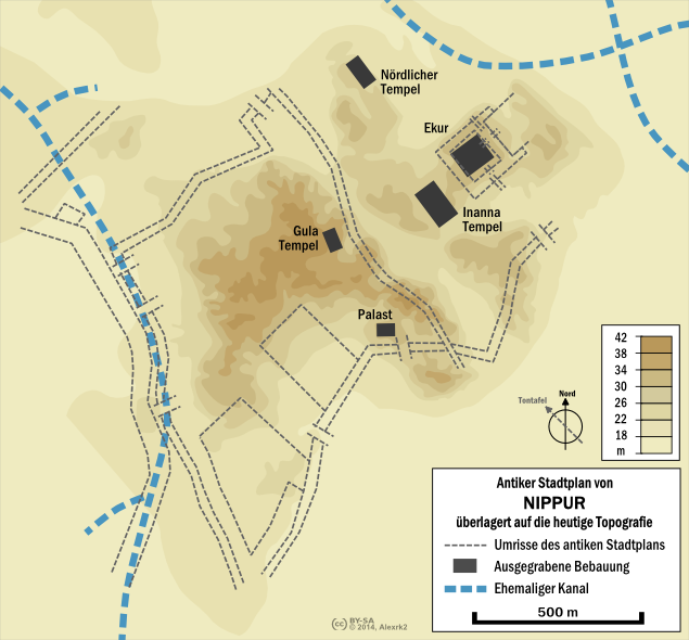 Karte mit dem antiken Stadtplan von Nippur, über einer modernen topografischen Karte gelegt. Die Ausrichtung des antiken Stadtplans erfolgte nach Samuel N. Kramer und McGuire Gibson.